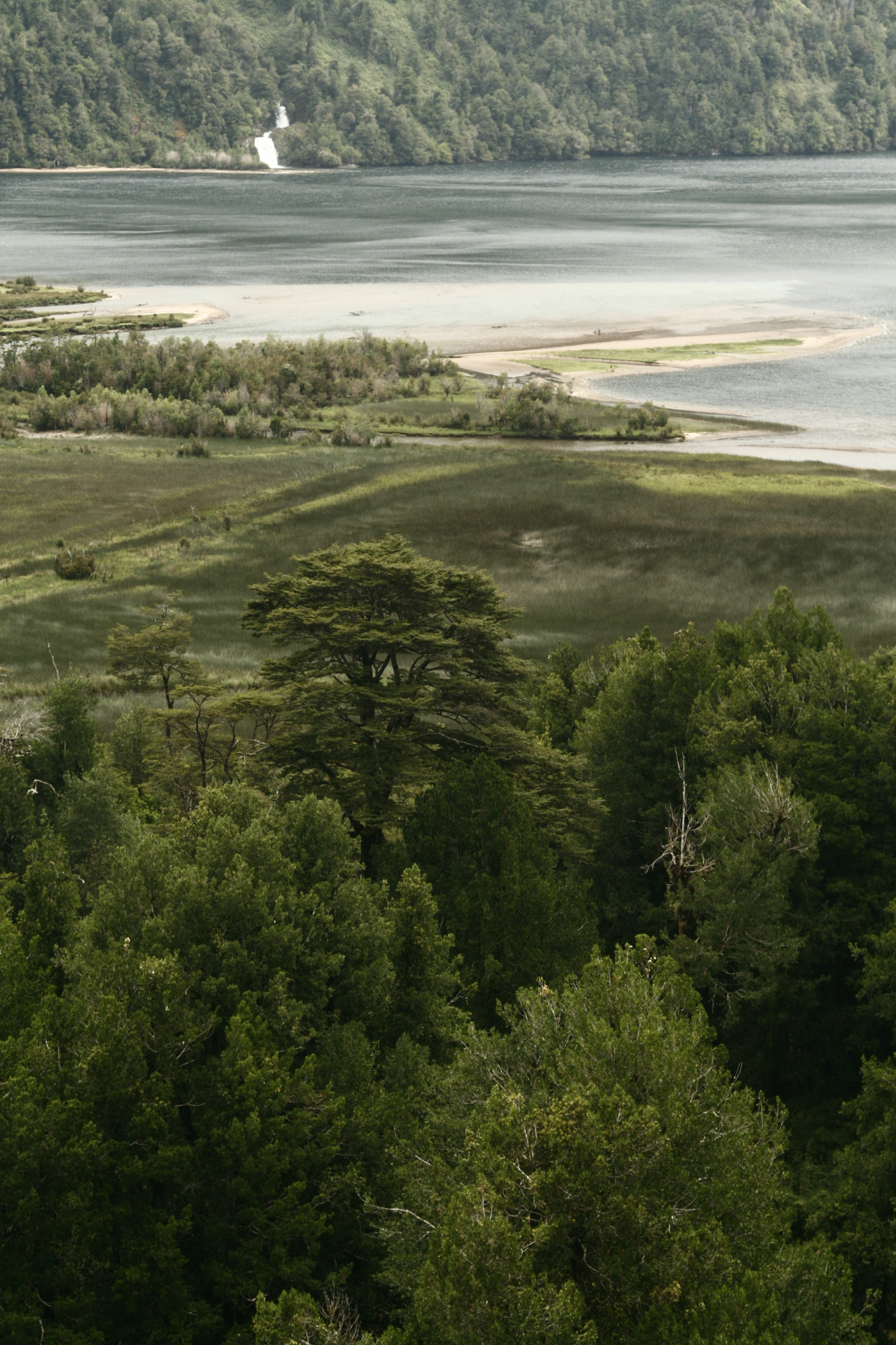 Laguna Alta